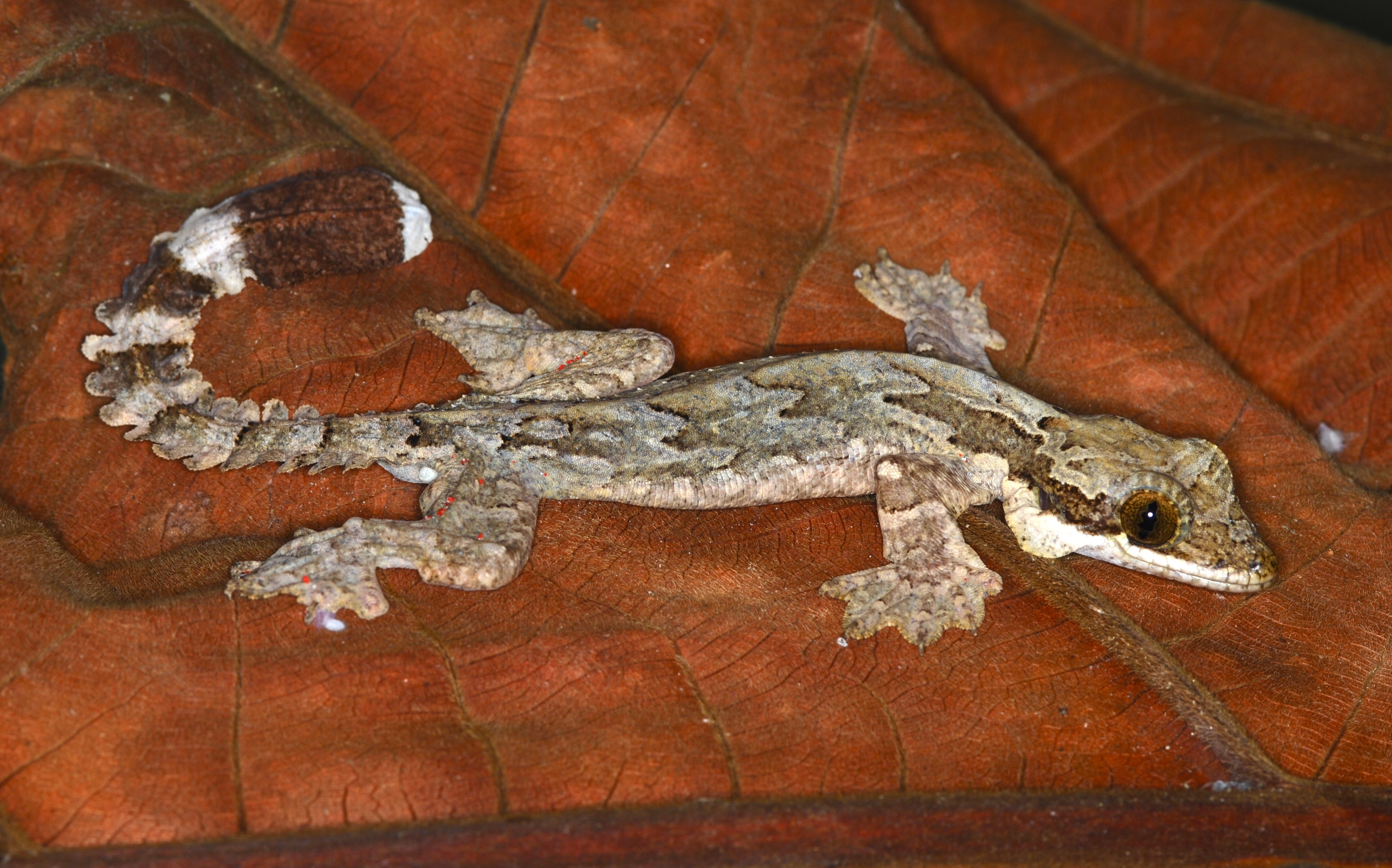 Tapah Hills, Perak, MALAYSIA